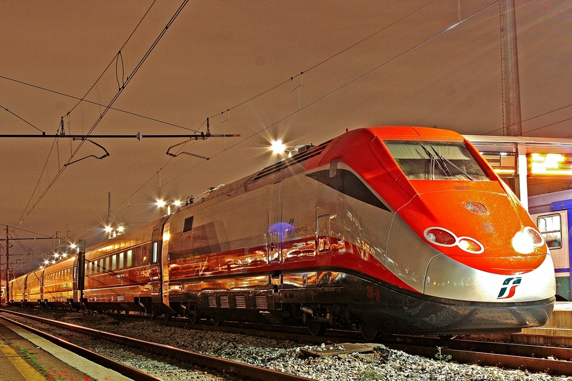 ETR 500.28 di Trenitalia dopo essere arrivato a Milano Greco Pirelli